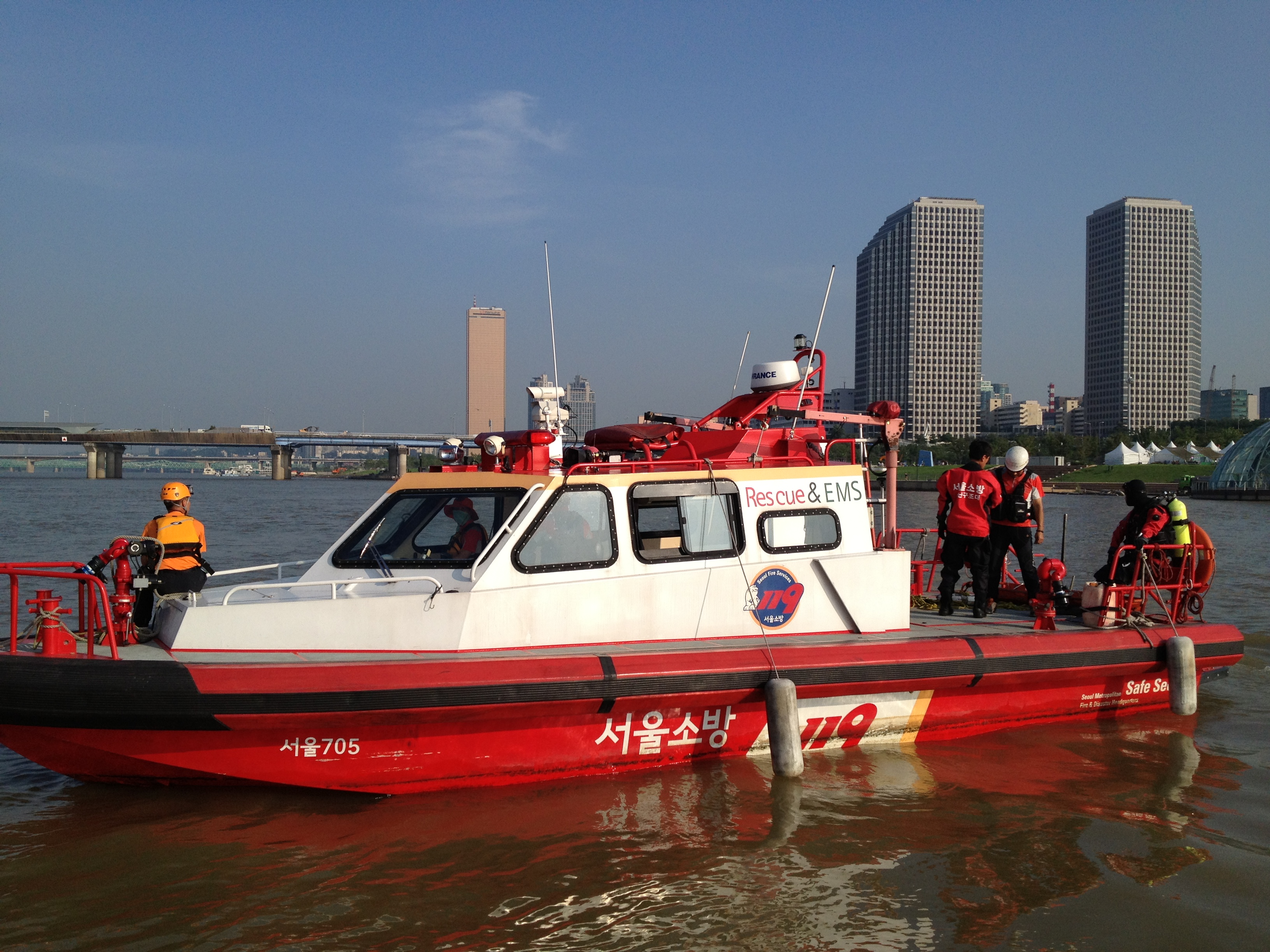 2013년 7월 남성연대 대표 성재기 한강 투신사건 119특수구조단 수난구조대 구조 활동